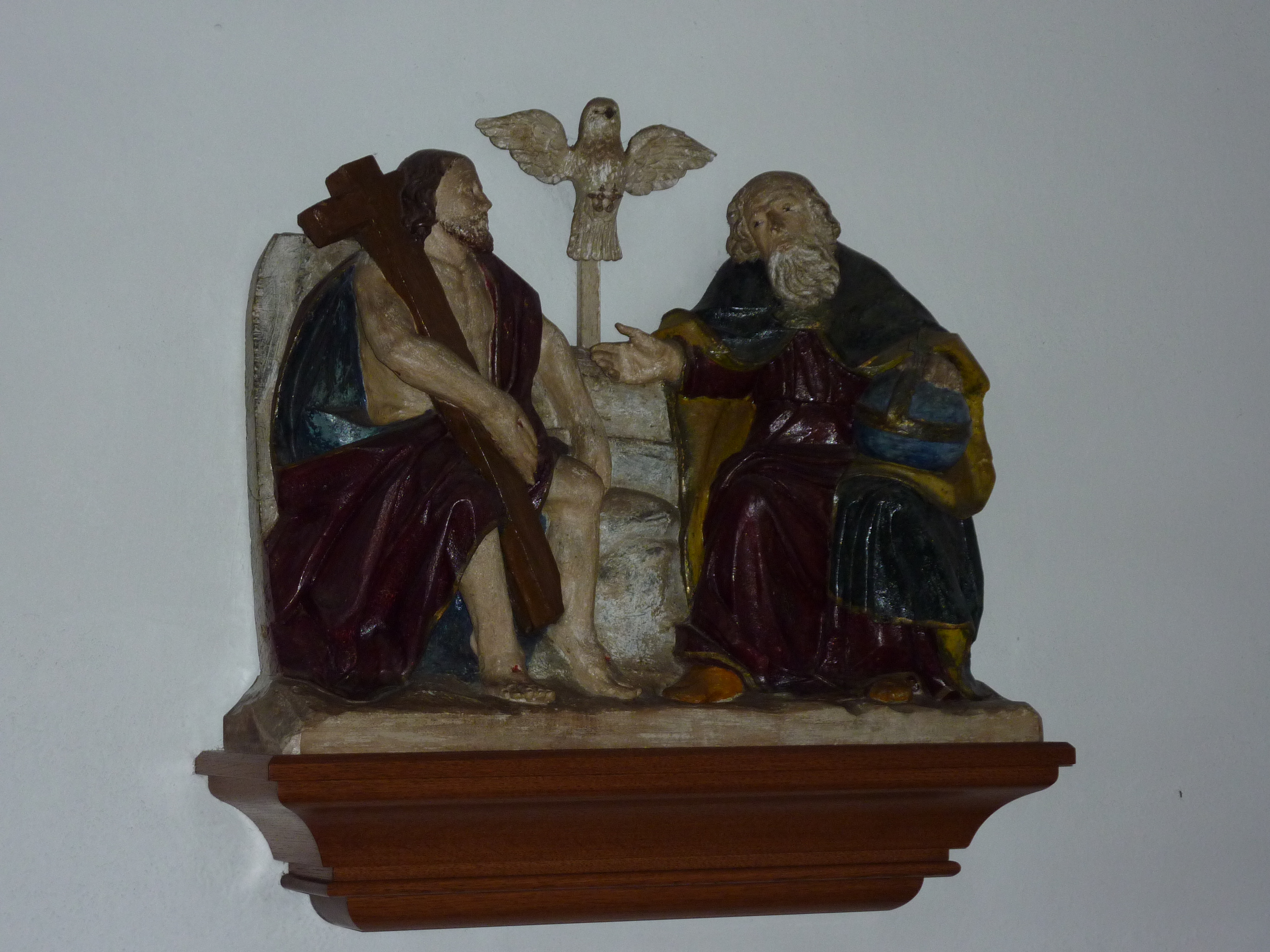 Uedelhoven, Kreuzstr. 24, kath. Pfarrkirche, Gnadenstuhl